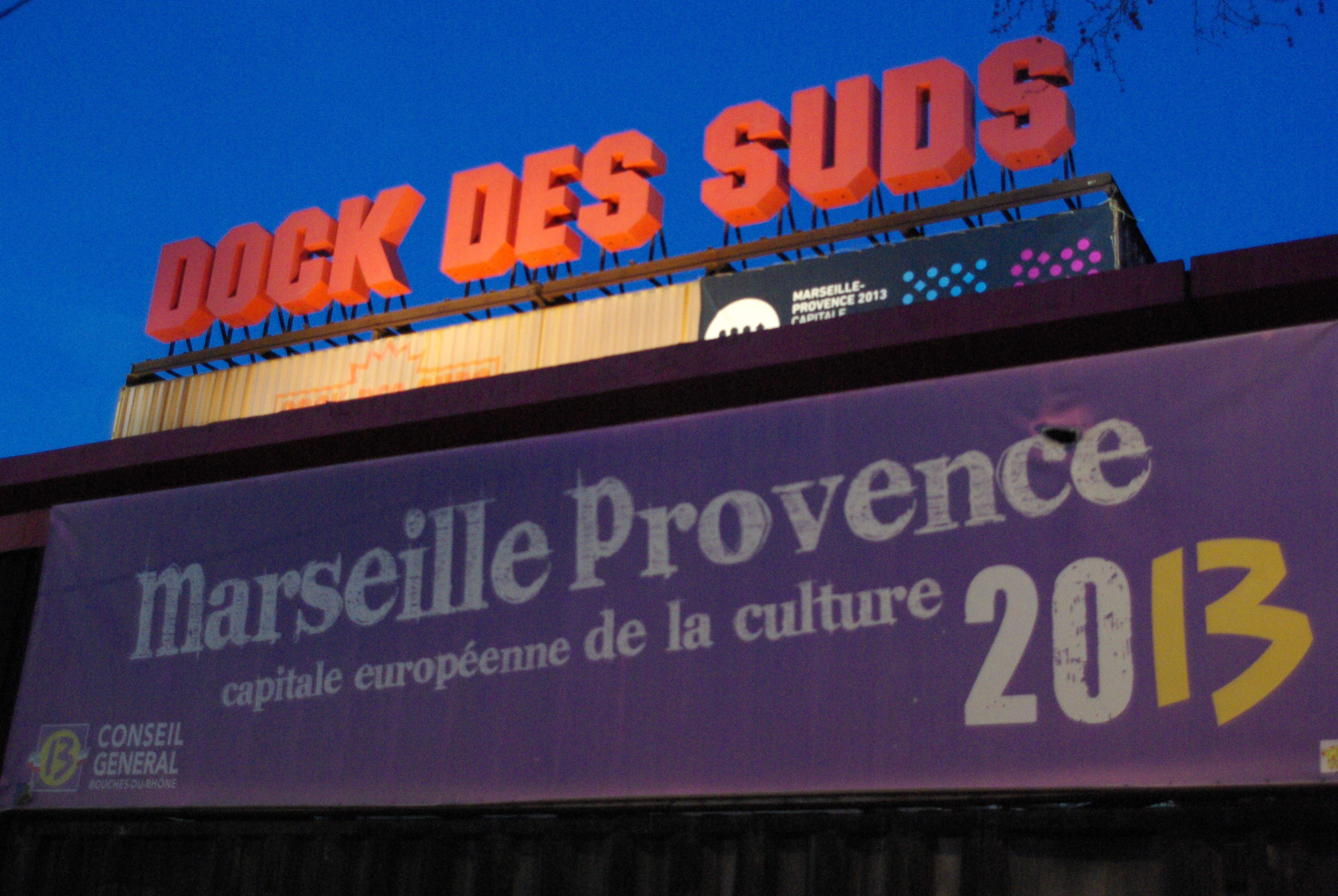 Zentrum für Kulturveranstaltungen - 'Dock des Suds' in Marseille - Frankreich